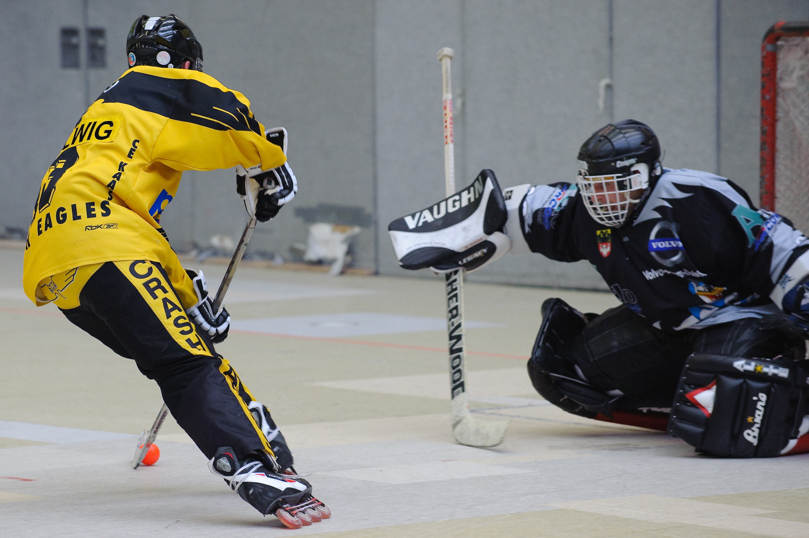 Torsituation beim Inline-Skaterhockey, 1. Bundesliga: Crash Eagles Kaarst I vs. Duisburg Ducks I am 4. 4. 2009